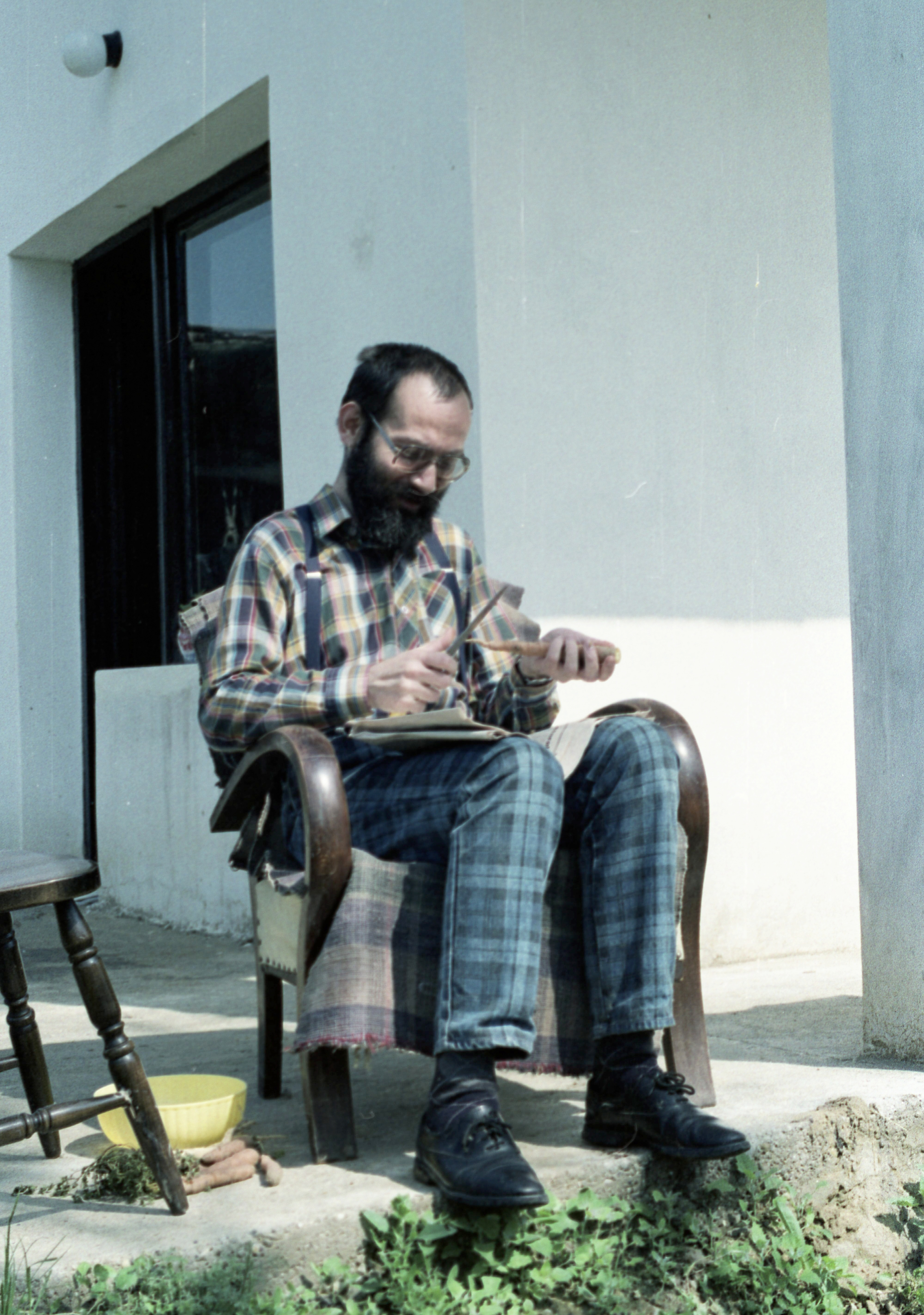 Tamás Gáspár Miklós. Location: Hungary, Perőcsény Tags: colorful, celebrity, politics Title: Tamás Gáspár Miklós.